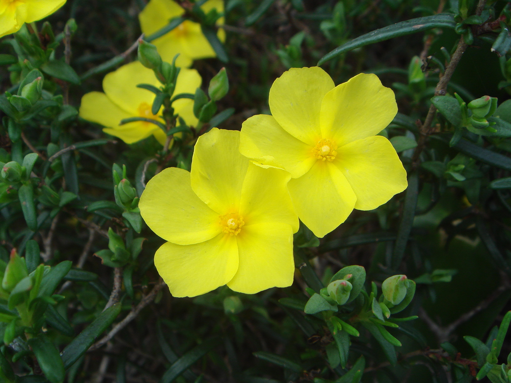 (Halimium calycinum), Chiclana (Cádiz) España